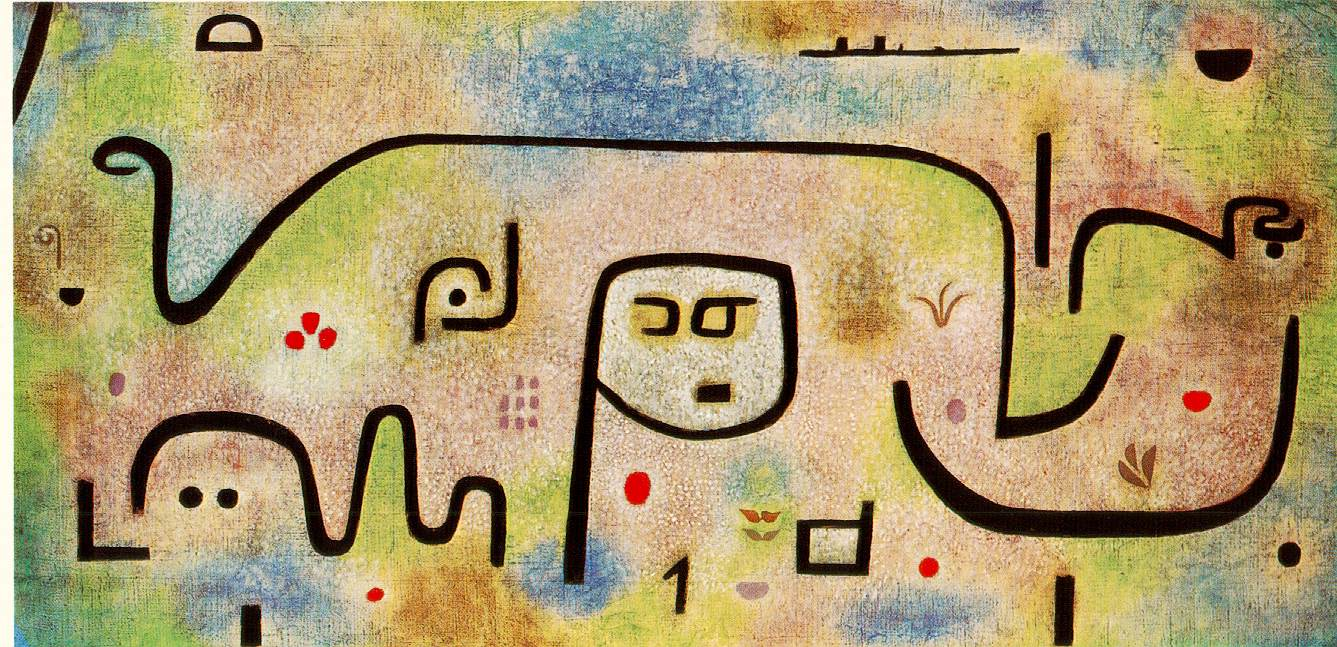 Insula dulcamaratitle QS:P1476,de:"Insula dulcamara" label QS:Lde,"Insula dulcamara"